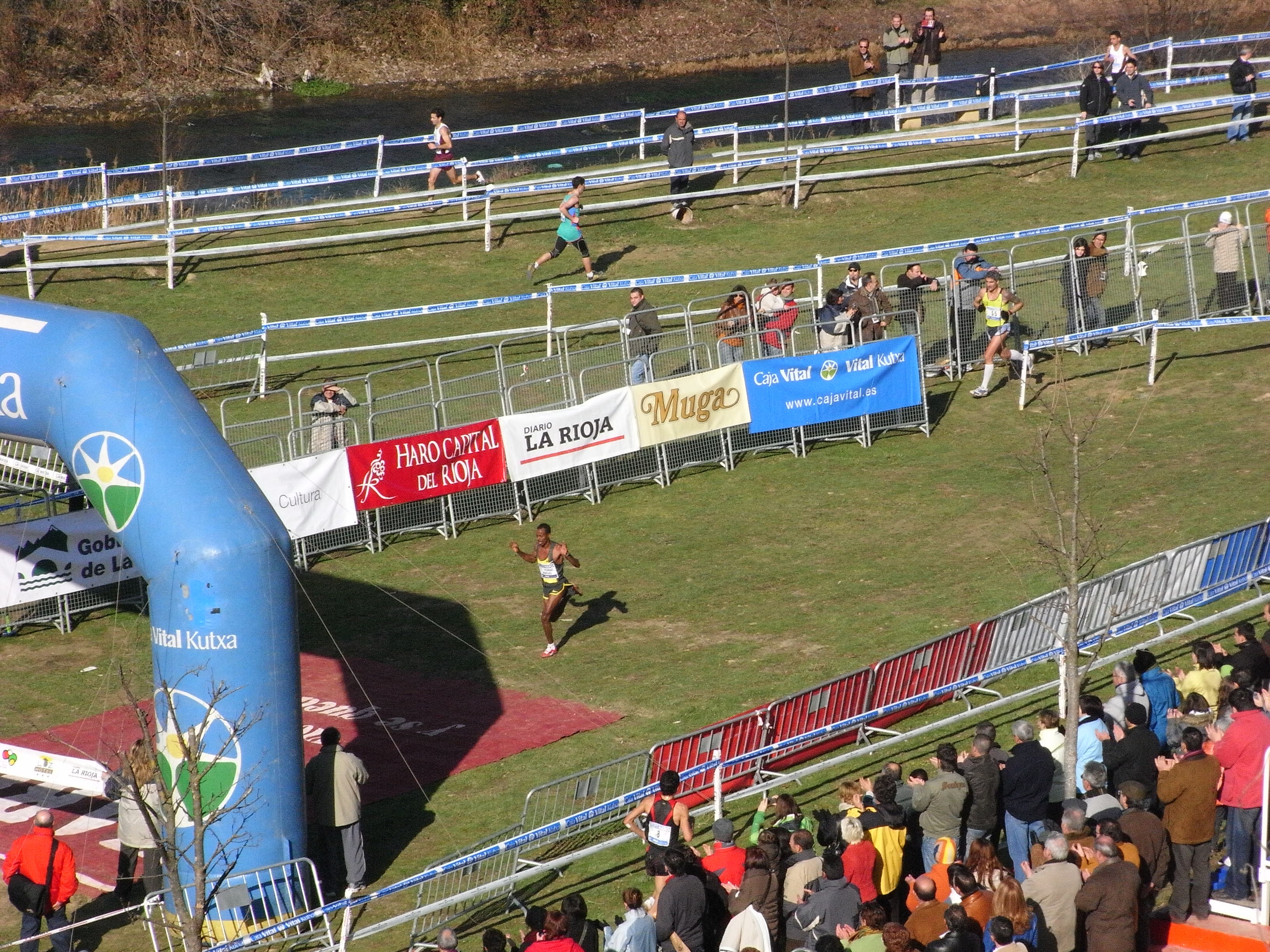 Yonas Kifles llegando a meta en solitario. Cross Ciudad de Haro en La Rioja (España)